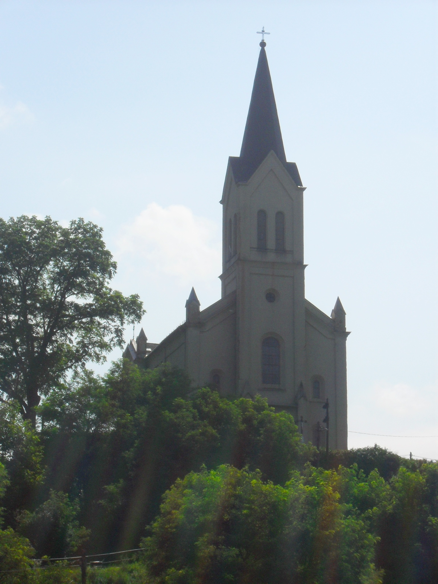 Karancslapujtő - Magyarok Nagyasszonya római katolikus templom